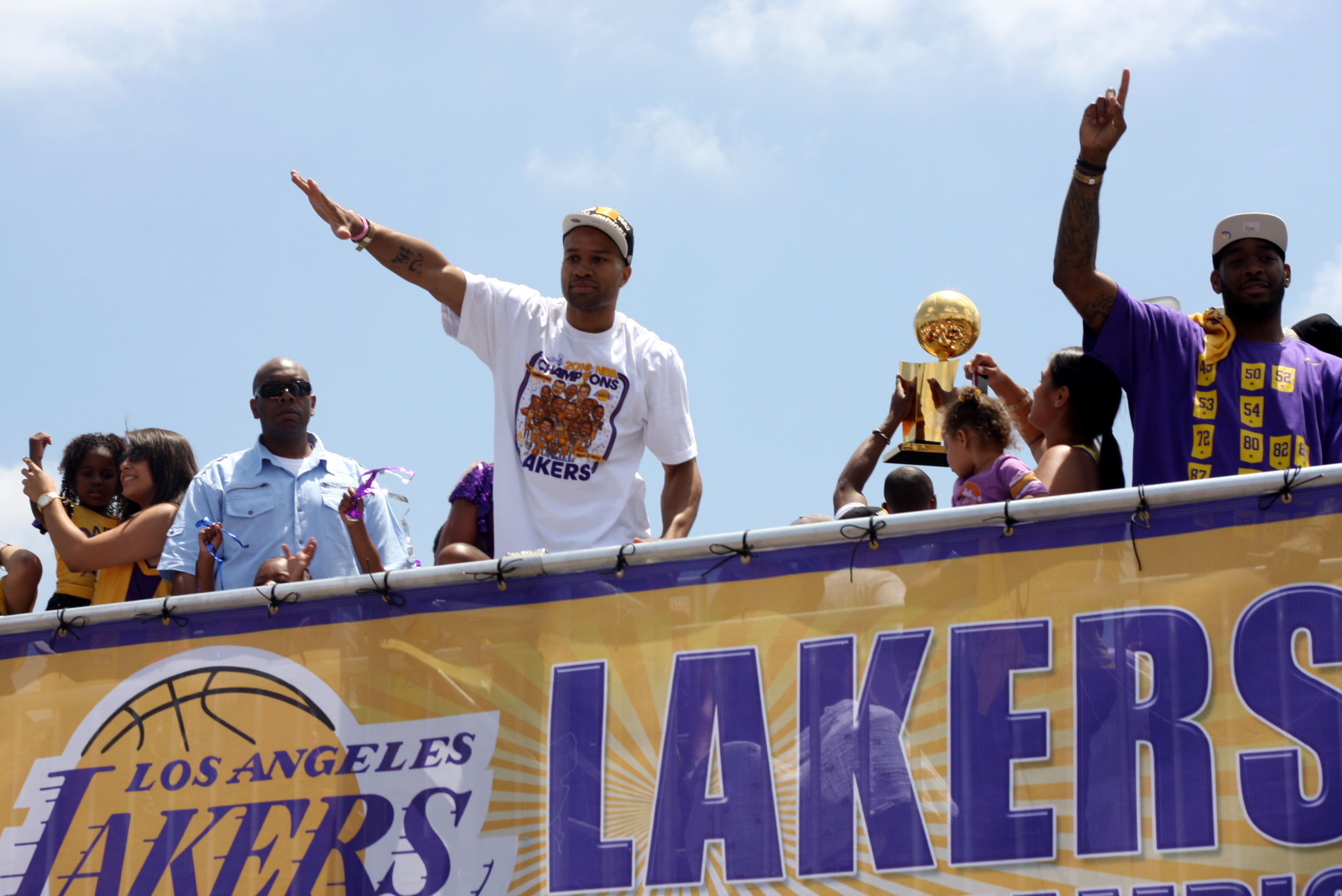 Lakers parade (66)